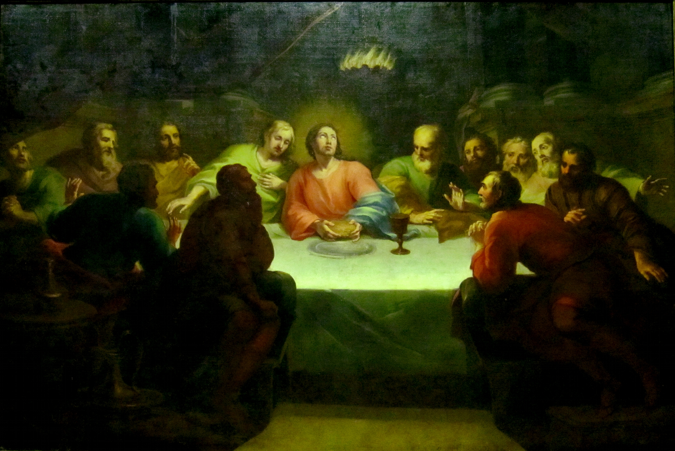 La cène par Bernard Joseph Wamps (début XVIIIème, date effacée) dans l'église Saint-Maurice de Lille. Le tableau provient de la chapelle des Récollets à Lille, détruite au cours de la Révolution (Rue des Arts, Lille).